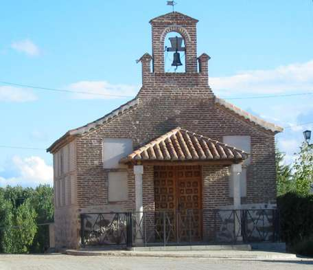 Ermita de santo tome de zabarcos